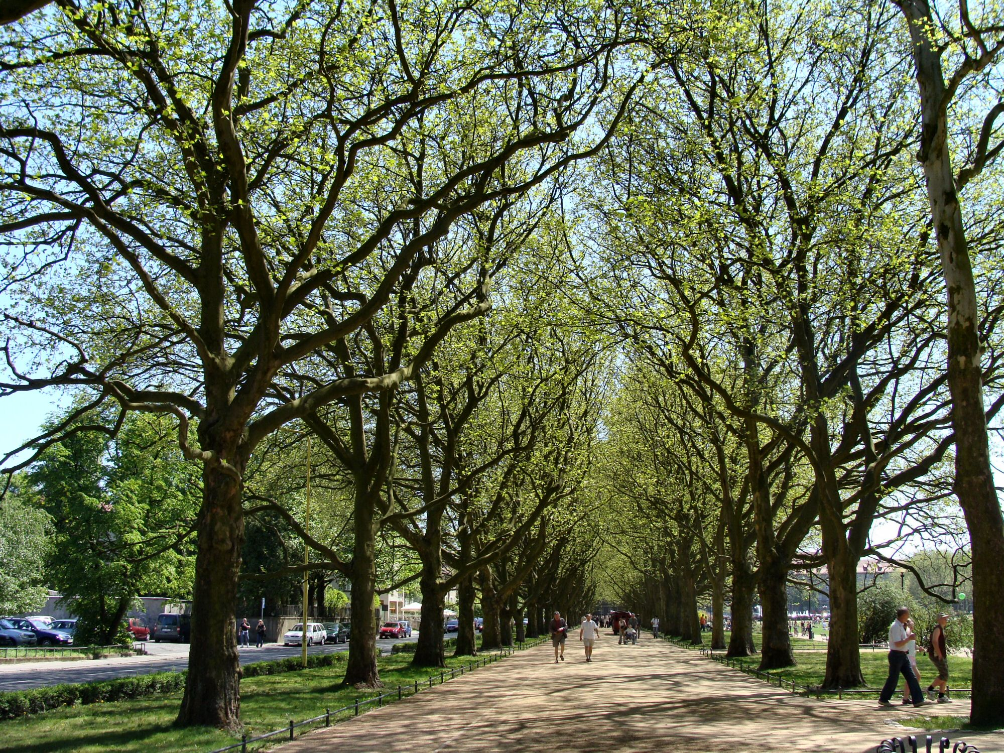 Aleja platanów na Jasnych Błoniach w Szczecinie - pomnik przyrody